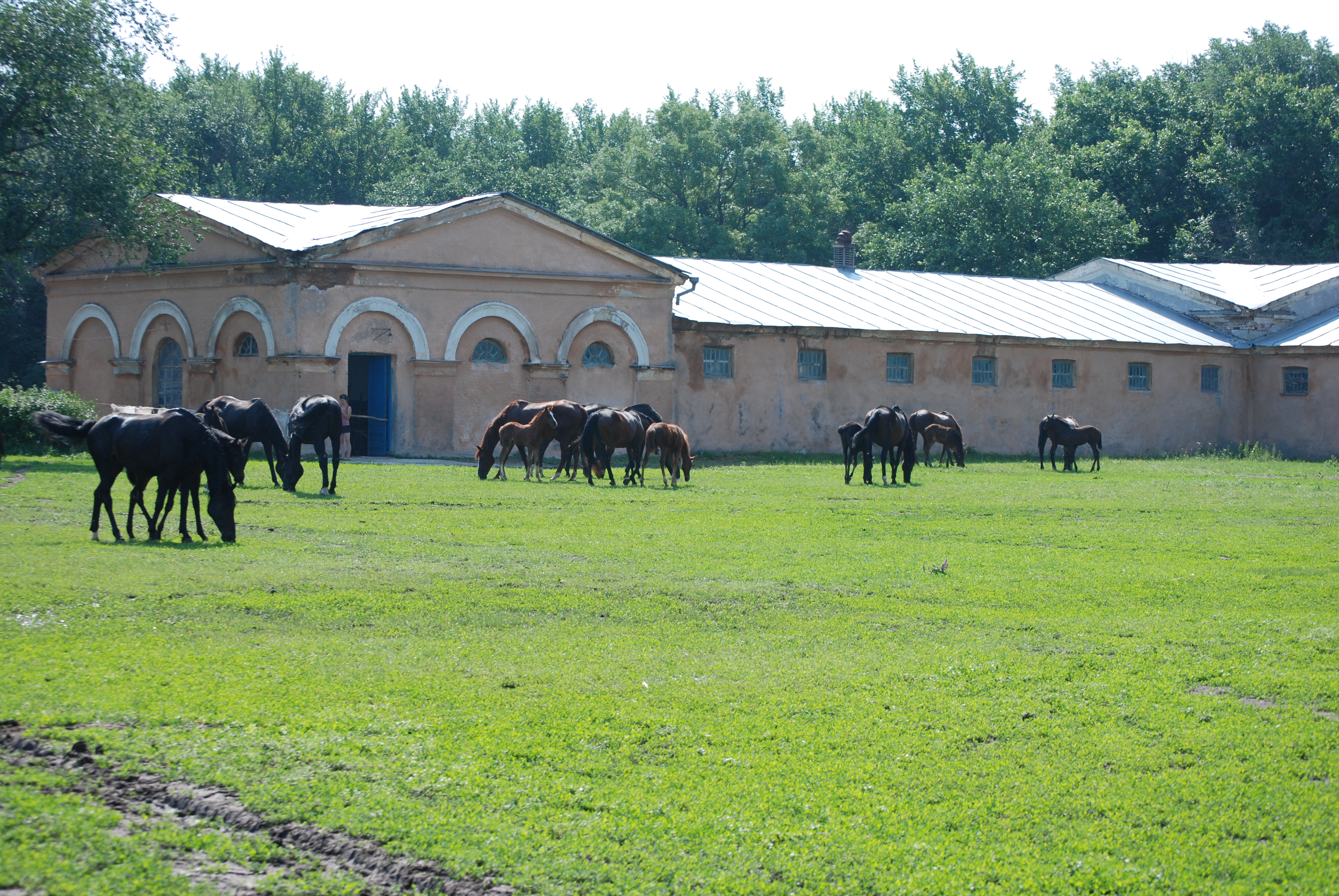 Комплекс споруд Деркульського кінного заводу, який відвідав радянський воєнний та державний діяч С. М. Будьонний, Данилівка